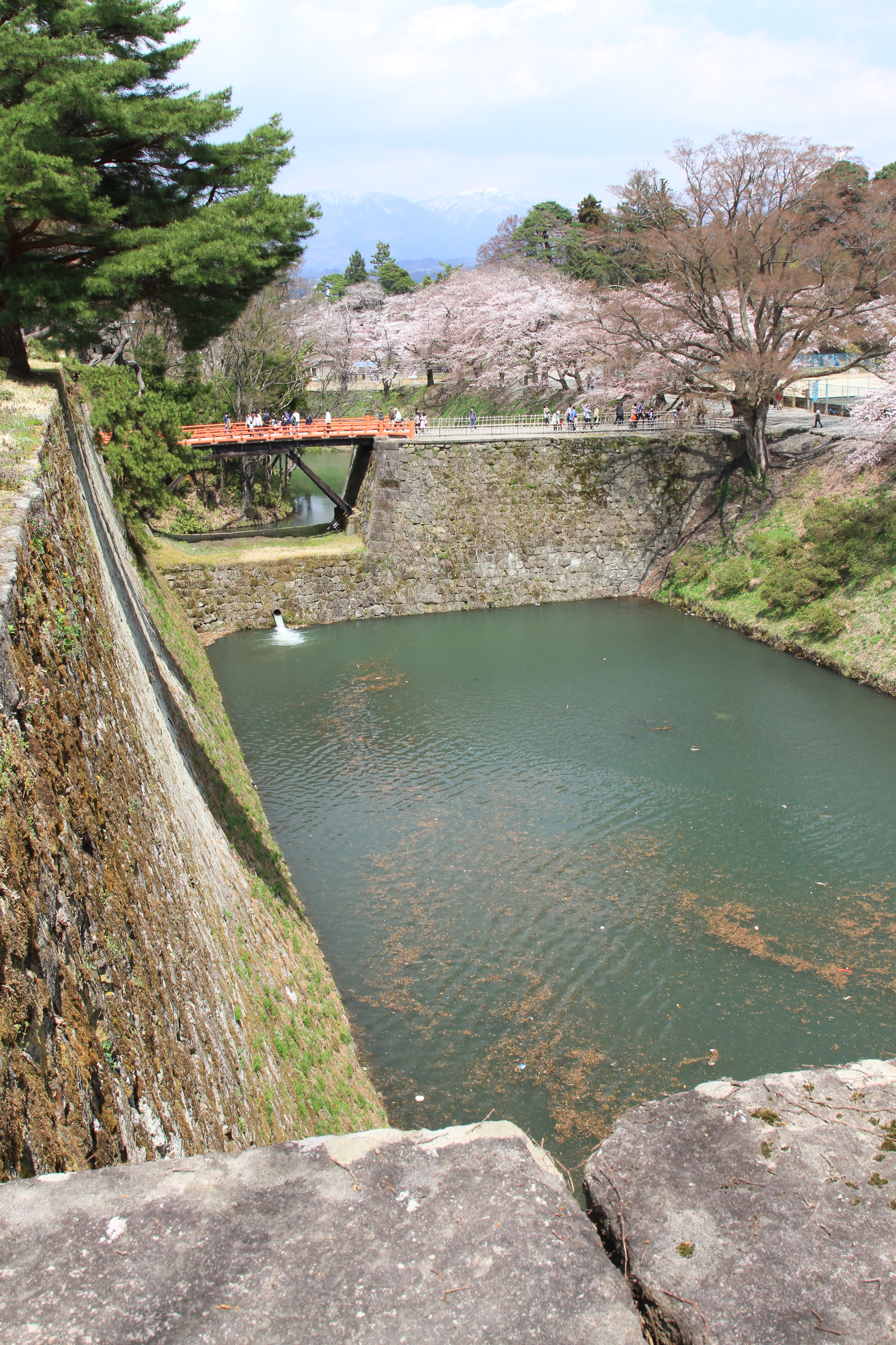 1 Ōtemachi, Aizuwakamatsu-shi, Fukushima-ken 965-0873, Japan